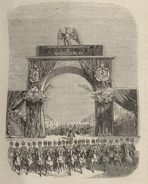 Arc de triomphe des artistes de l'Hippodrome (qui fut alors l'Hippodrome de l'Étoile) et des Arènes nationales élevé en hommage au prince président.